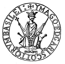 EDgar Skotský